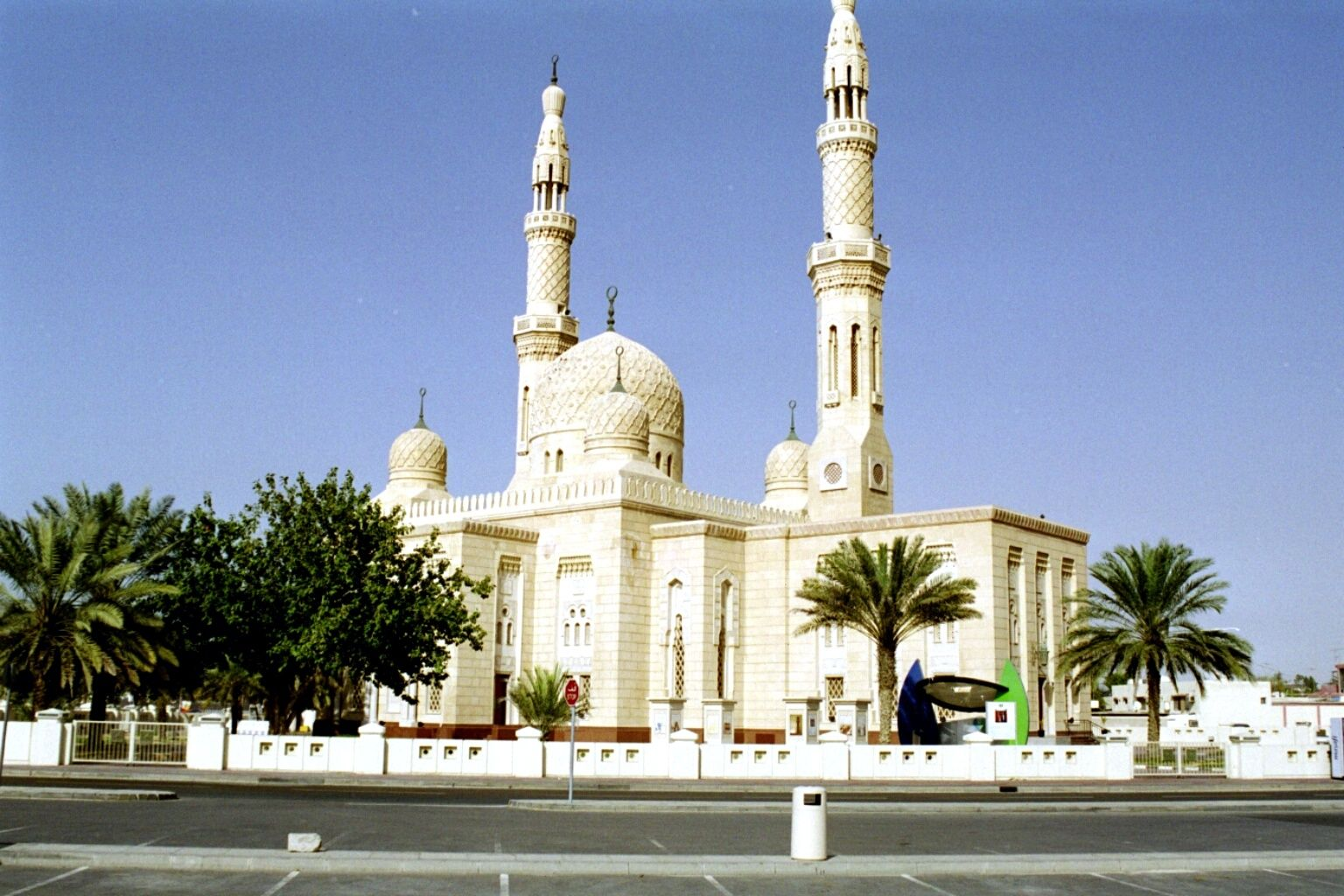 Dubai, Jumaira Moschee